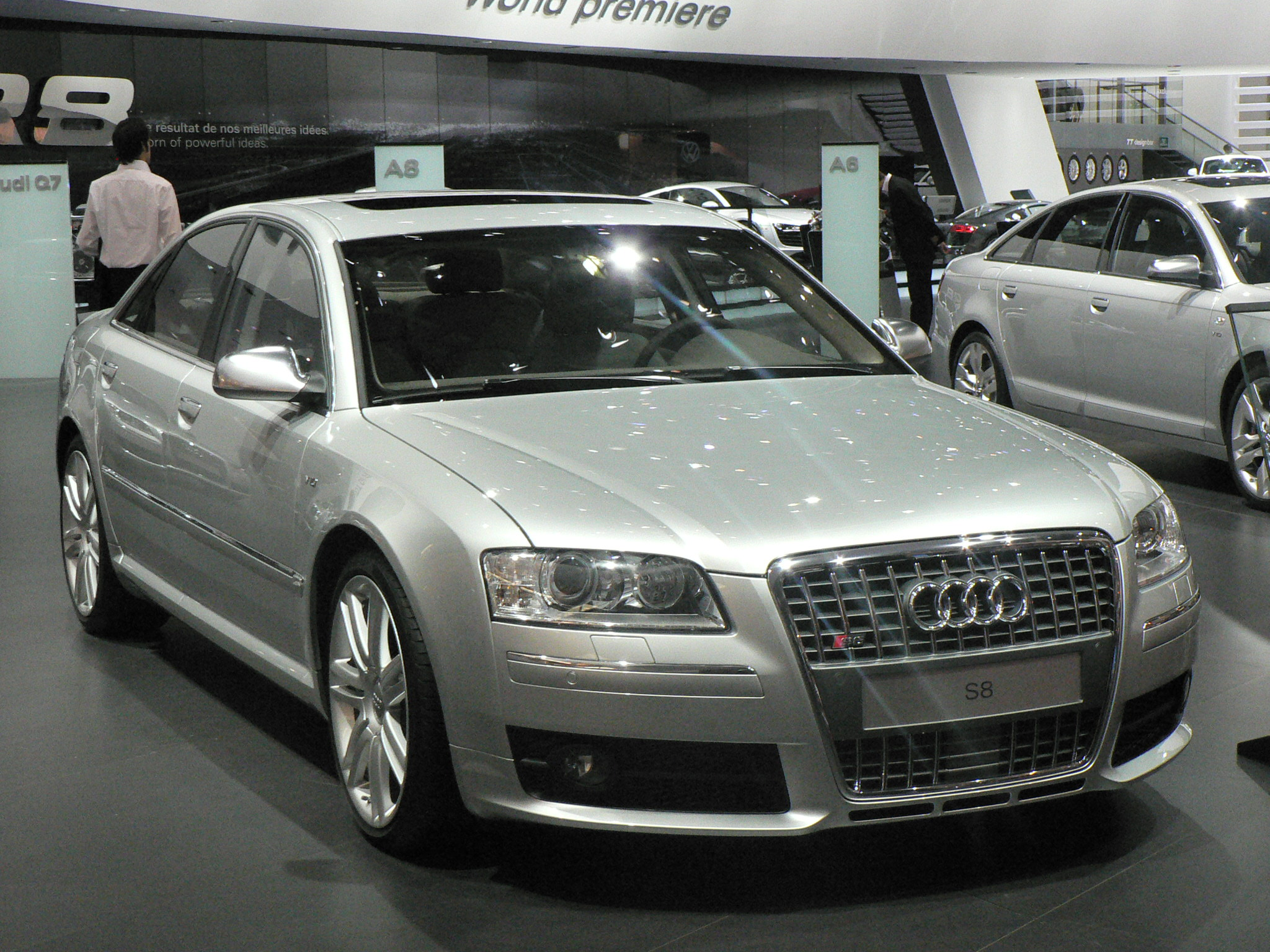 Mondial de l'automobile de Paris (october 2006)